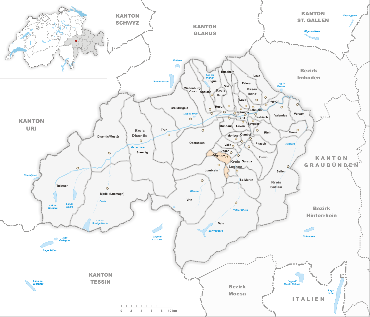 Municipality Vignogn